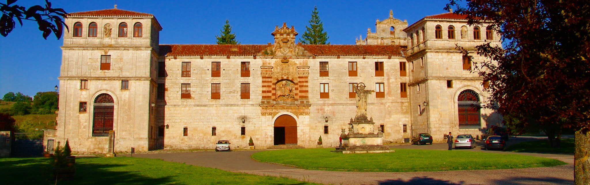 Vista general, Monasterio de San Pedro de Cardeña, Castrillo del Val, Burgos, España